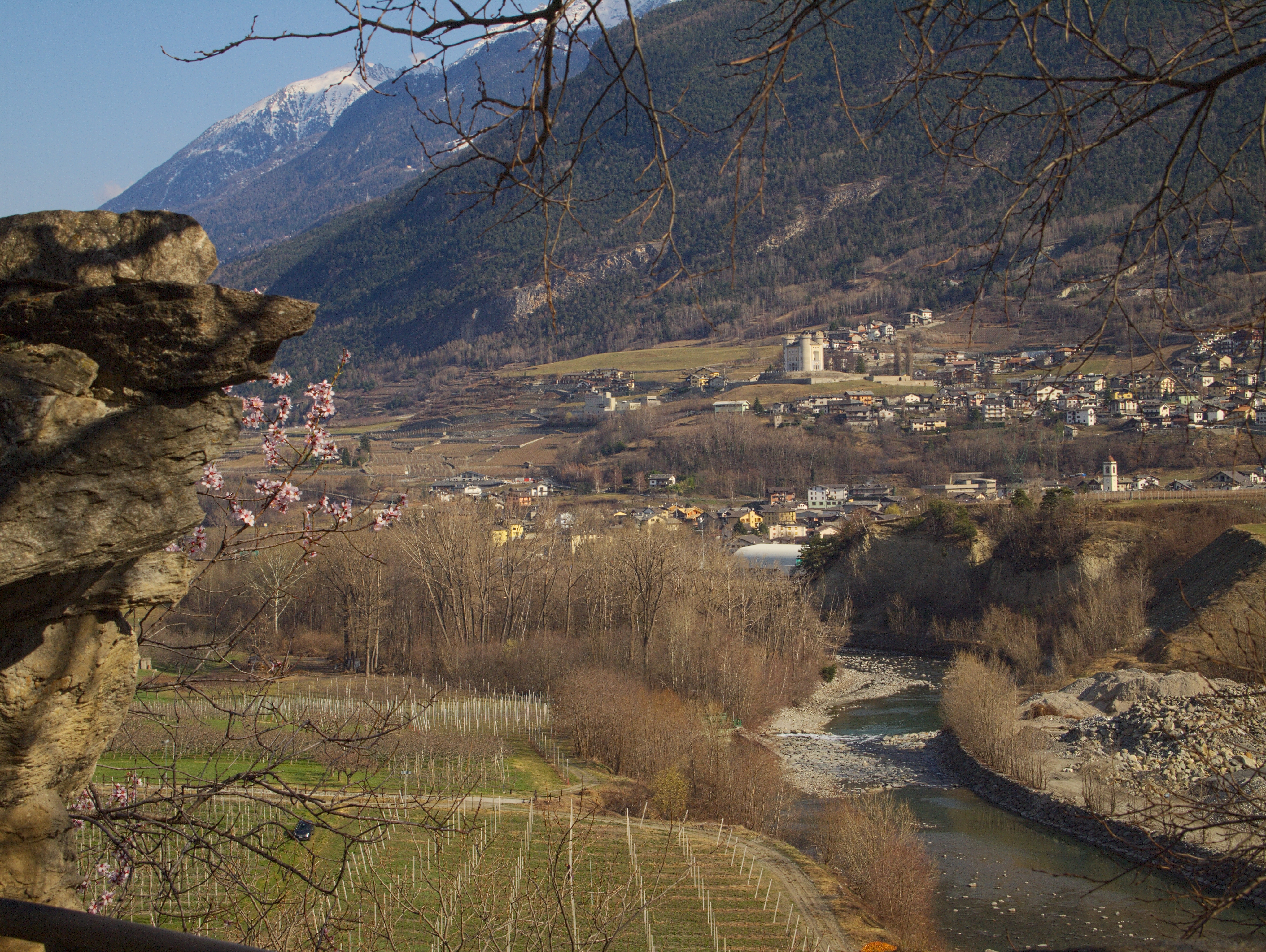 Panorama di Aymavilles, Valle d'Aosta, Italia.